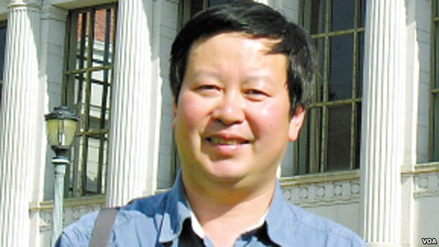 Xia Yeliang